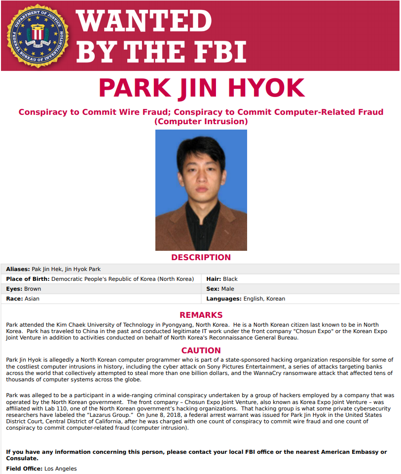 Cartel de la orden de captura de Park Jin Hyok